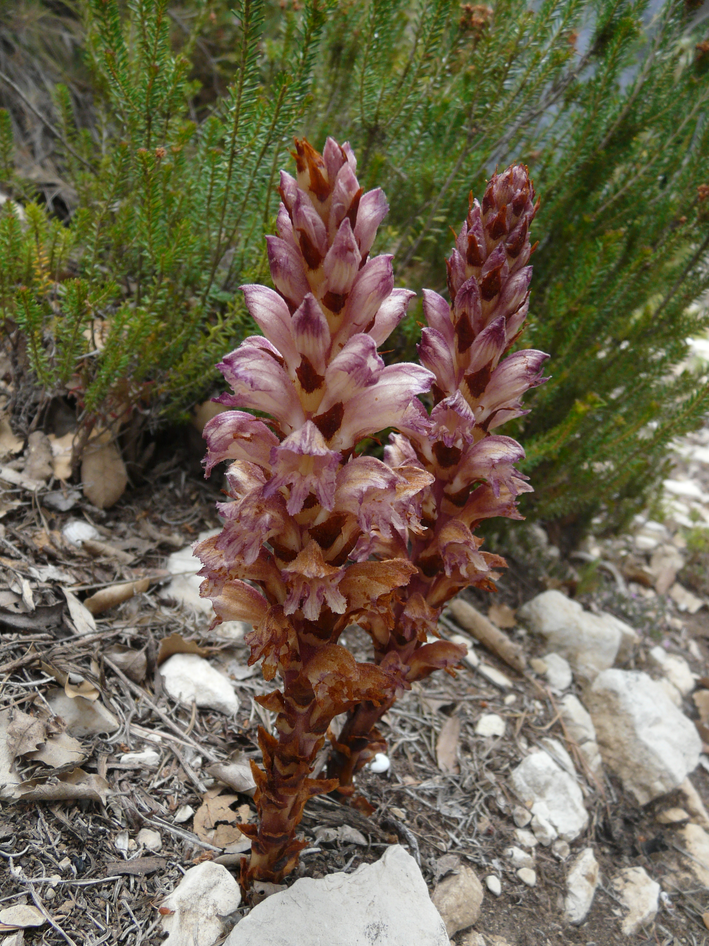 Fotografia presa entre Mont-ral i les fonts del riu Glorieta. Muntanyes de Prades (Baix Camp, Conca de Barberà, Alt Camp, Priorat, Garrigues) (Montblanc, Vimbodí, Mont-ral i altres). This is a a photo of a natural area in Catalonia, Spain, with id: ES510143